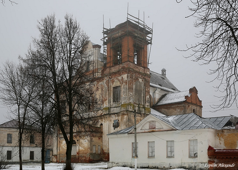 Мсціслаў. Касцёл Святога Міхаіла Арханёла